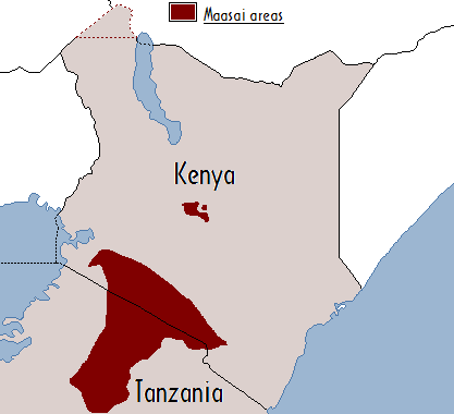 Maasai inhabitation area in Kenya and Tanzania.